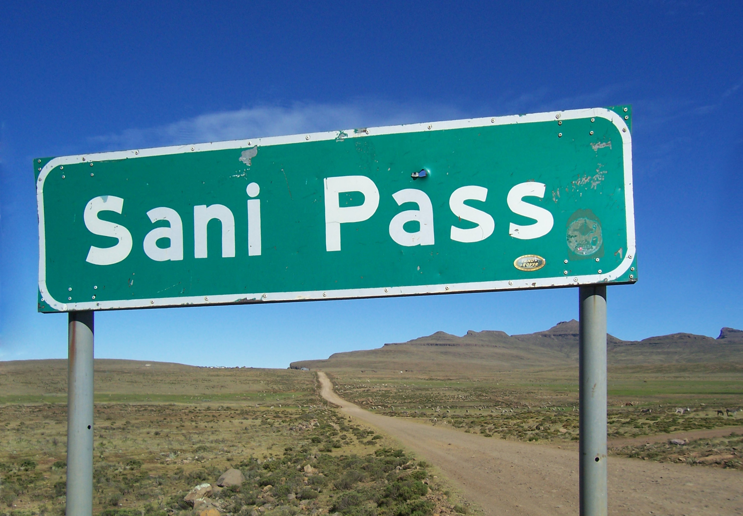 Sani Pass Sign